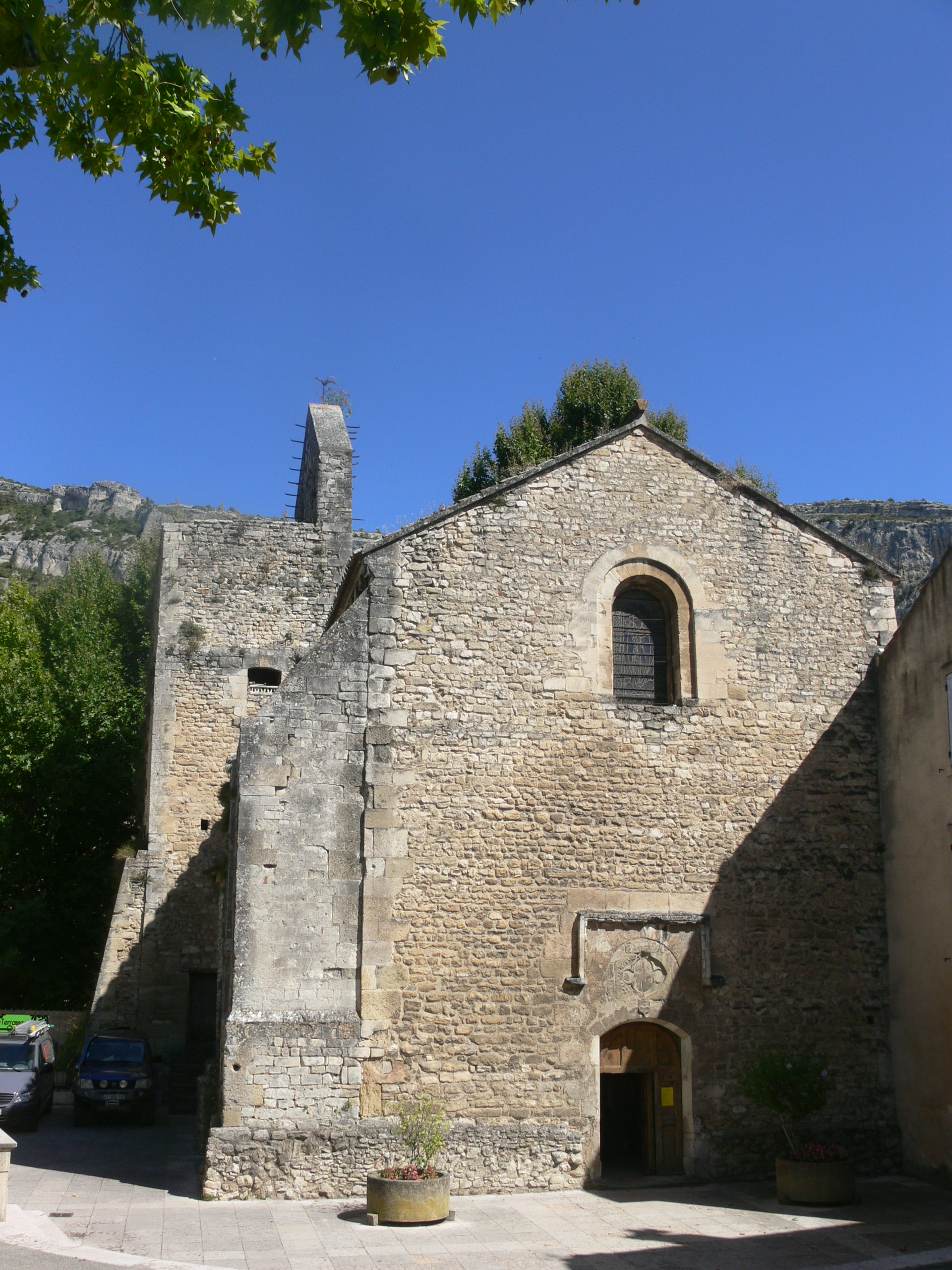 Fontaine-de-Vaucluse - église